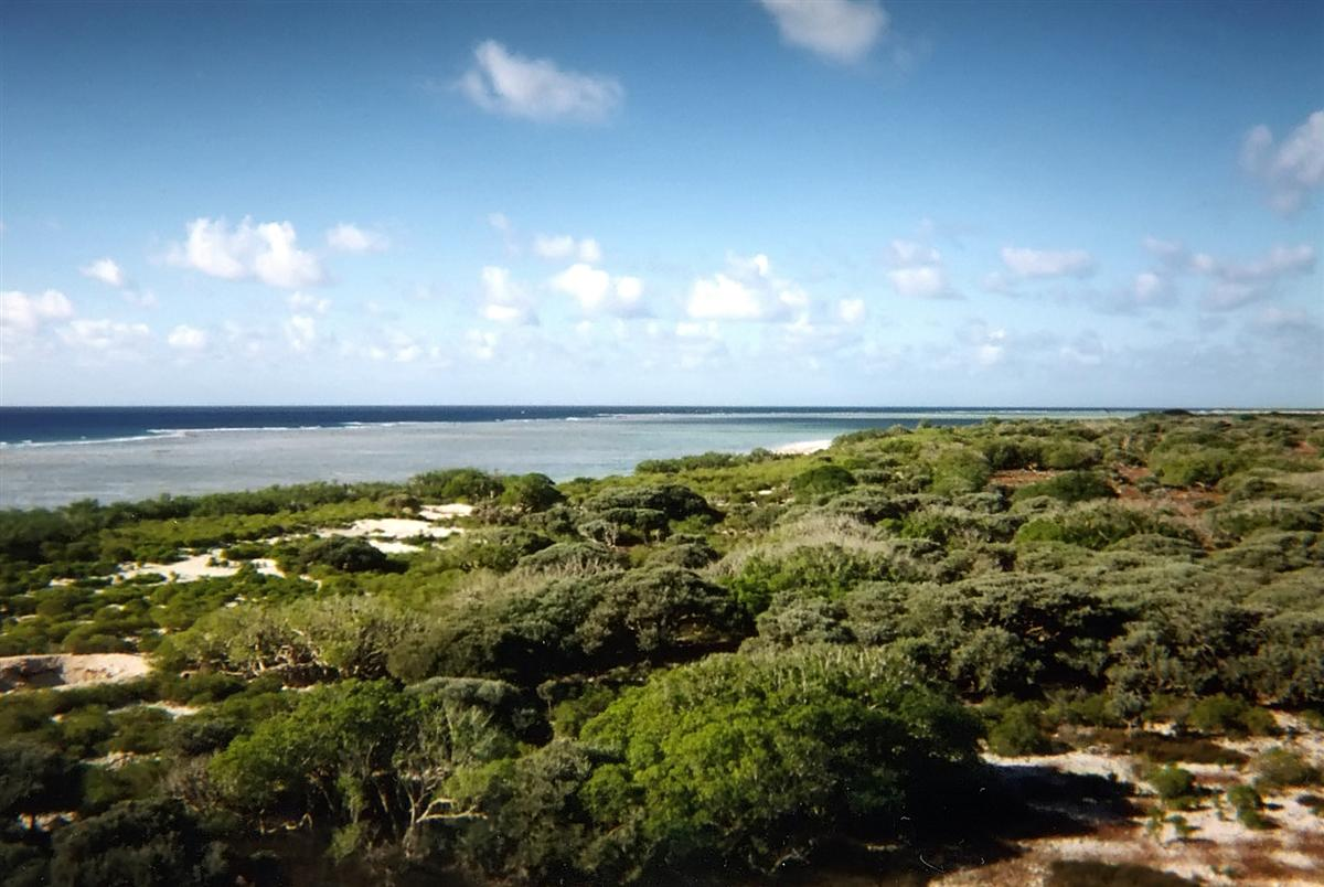 Vue d'une partie de l'île Europa depuis le sommet du phare